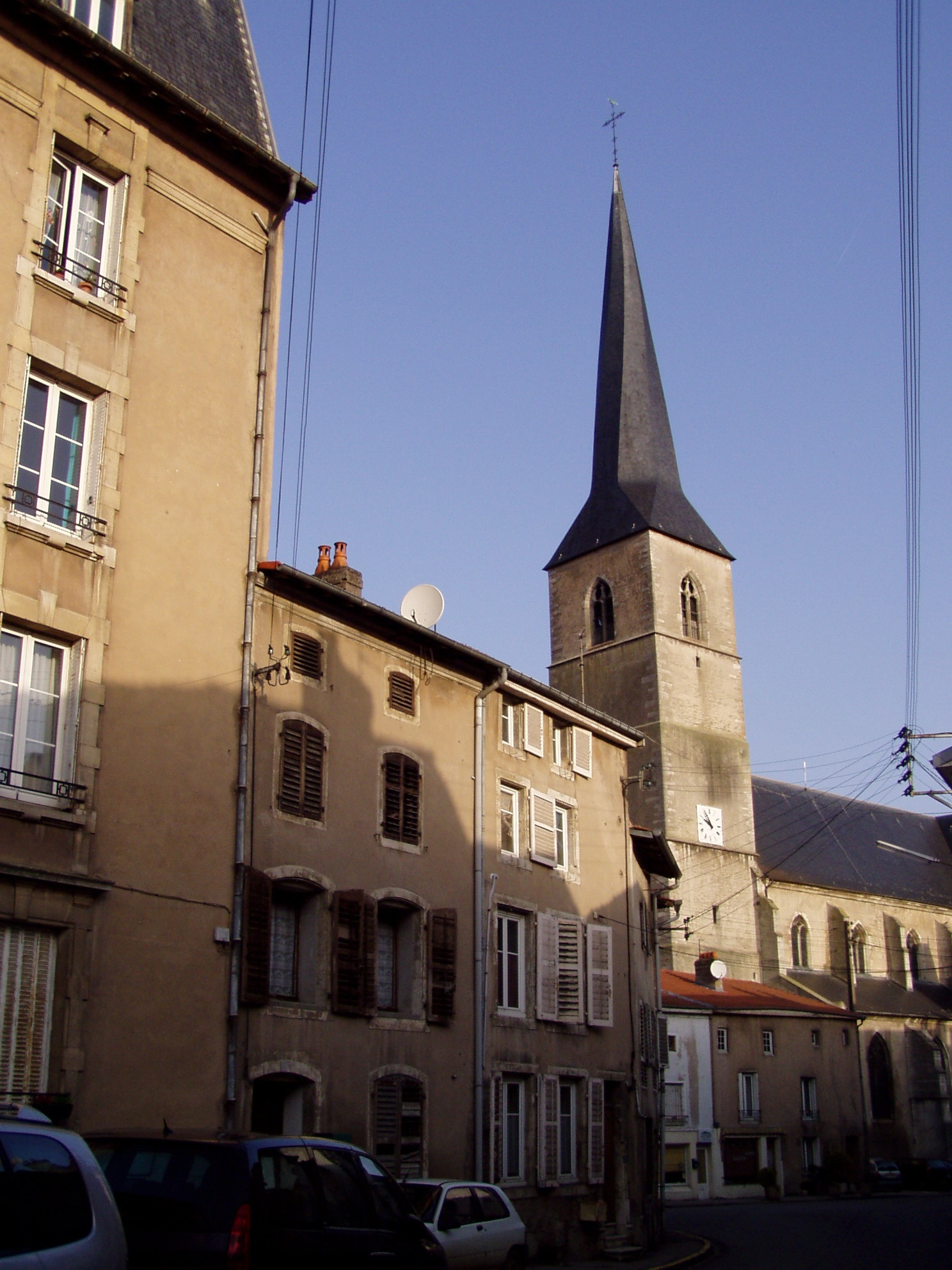 l'église de Vezelise avec son clocher tors